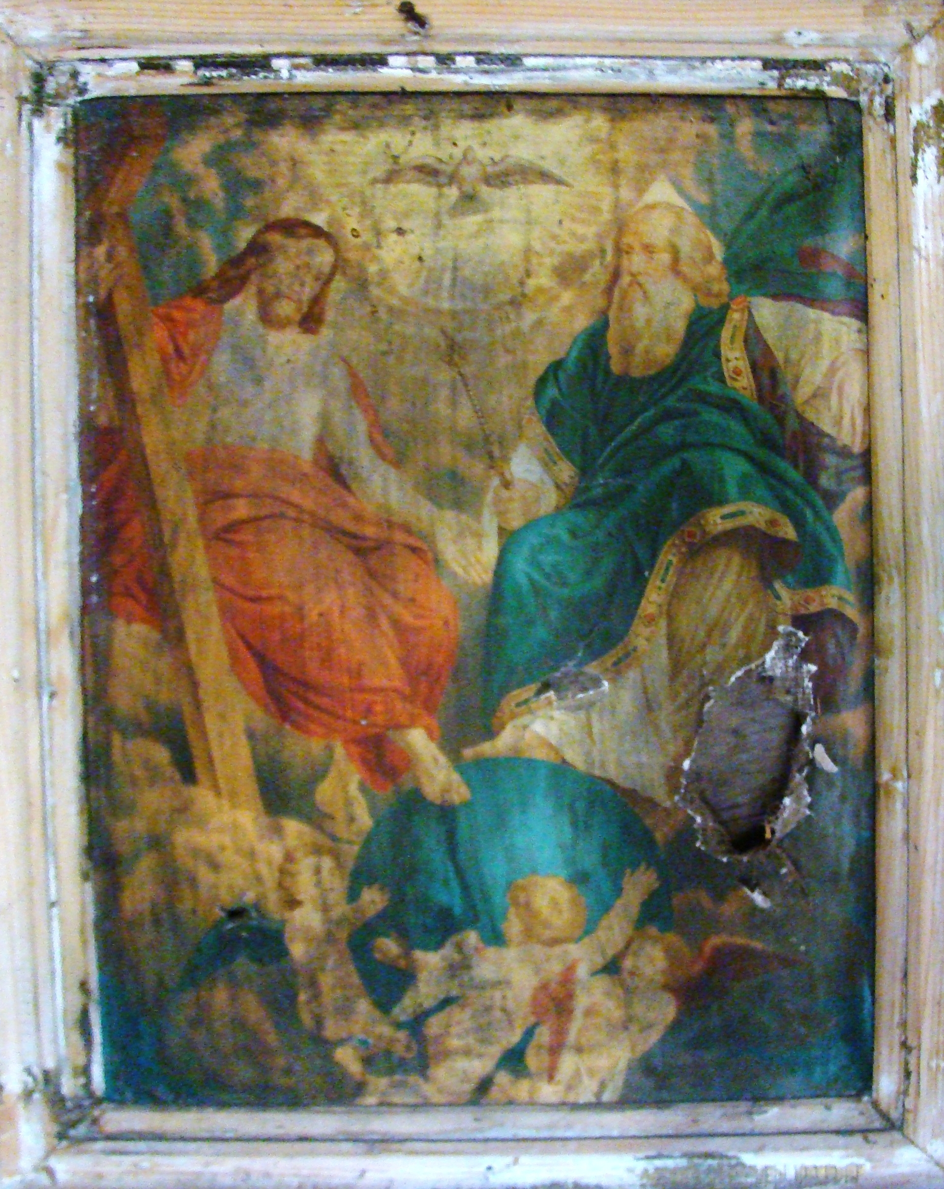 Biserica de lemn „Sfinții Arhangheli” din Săliștea, județul Alba